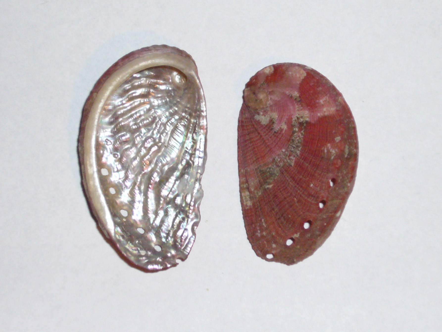 Haliotis tuberculata lamellosa from Liguria, Italy